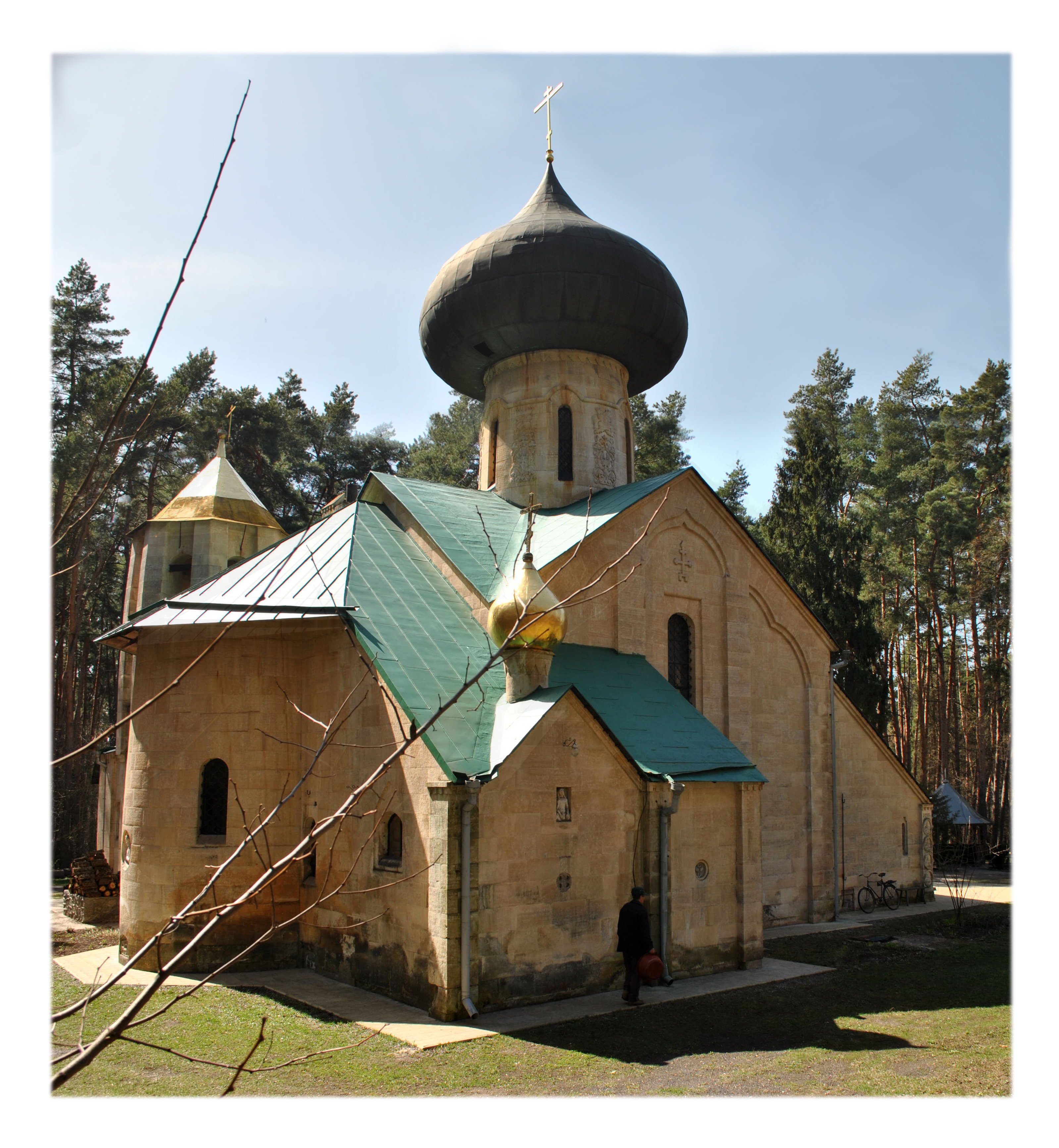 Спаська церква (мур.) (діюча), Володимирівка